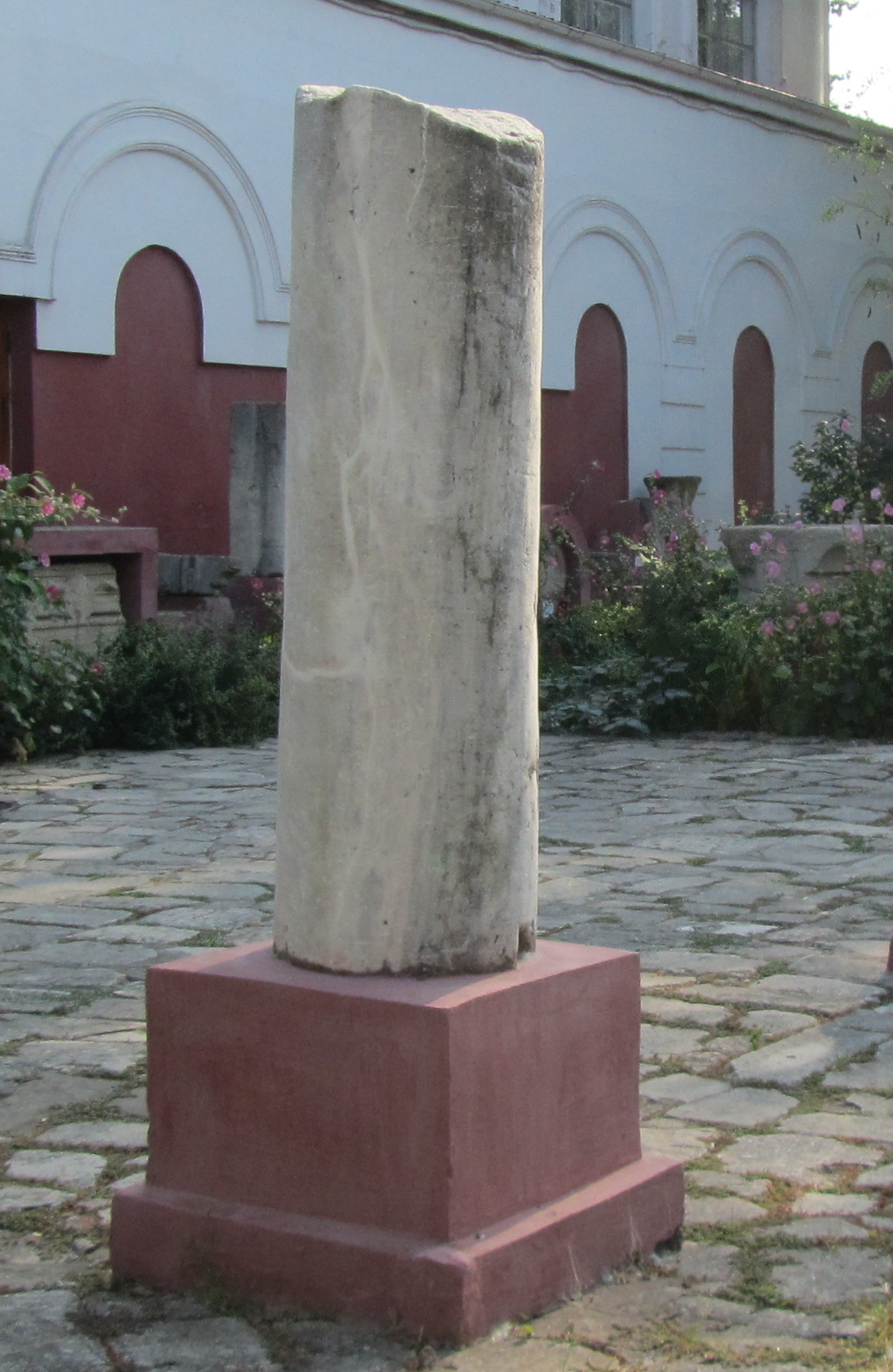 Остатки античных колонн во дворе Музея древностей (краеведческий). Феодосия. Крым. Август 2010